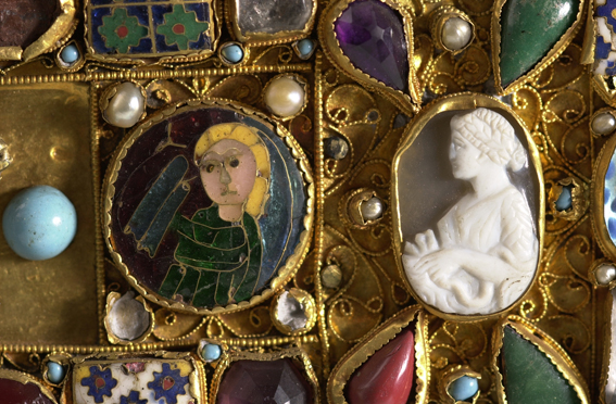 Detailaufnahme des Mathildenkreuzes des Essener Domschatzes. Bild der Domschatzkammer Essen, auf strikte Einhaltung der Lizenz bei Weiterverwendung ist zu achten!